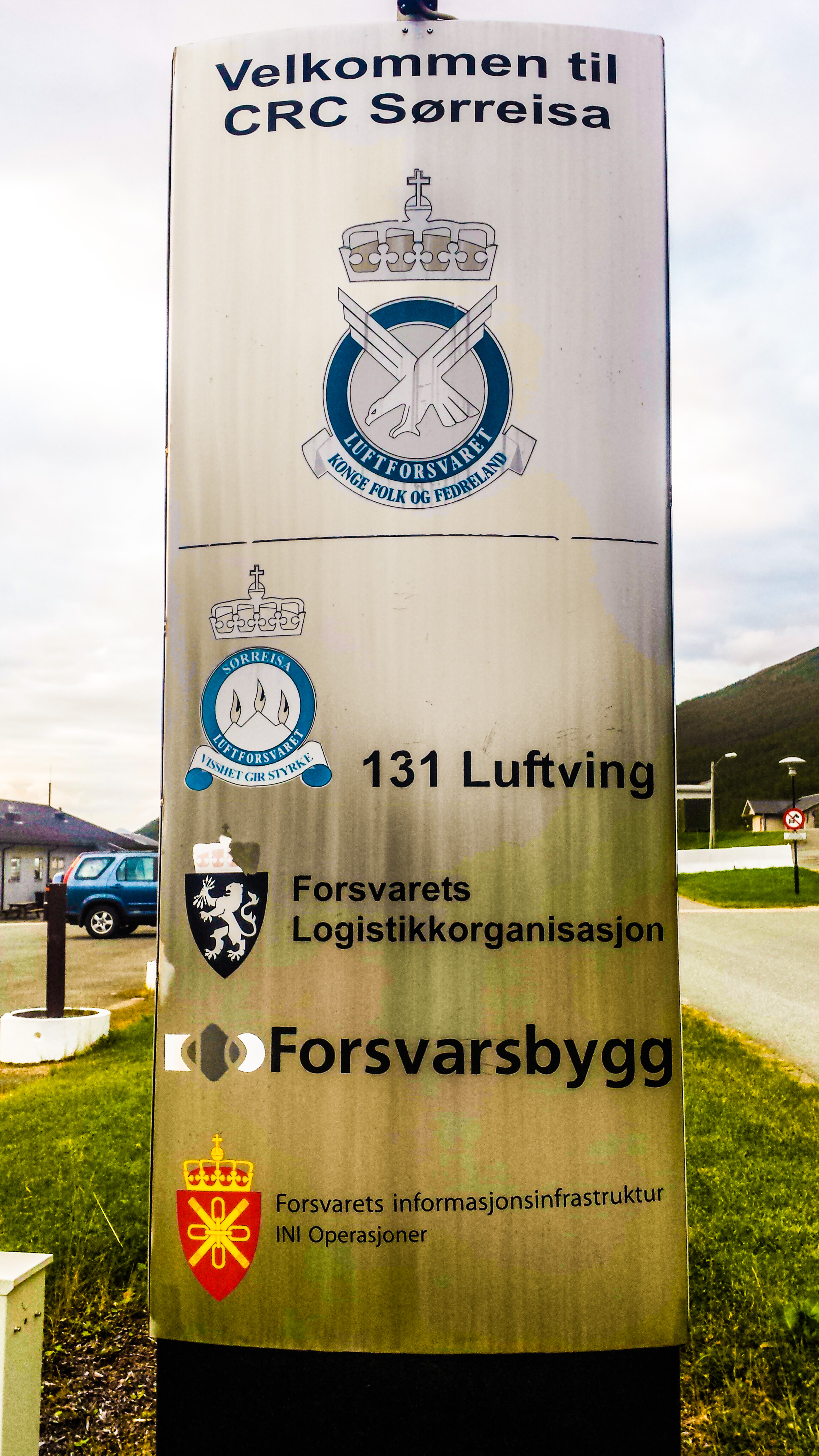 Velkommen til CRC Sørreisa